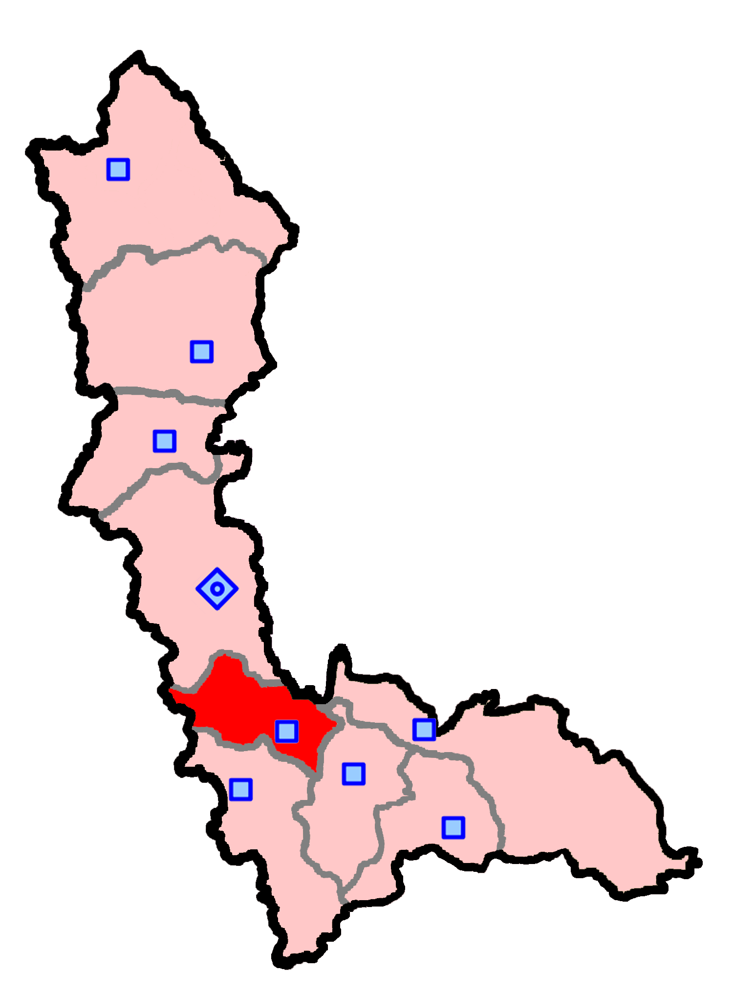 حوزهٔ انتخاباتی نقده و اشنویه برای انتخابات مجلس شورای اسلامی